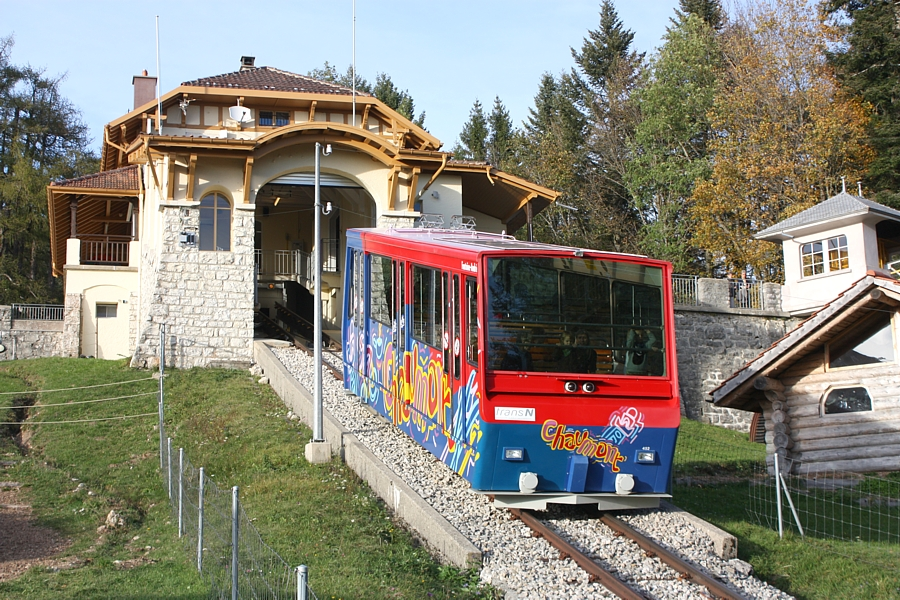 Funiculaire de Chaumont (Neuchâtel) quittant à la station supérieure de Chaumont - 26 octobre 2013